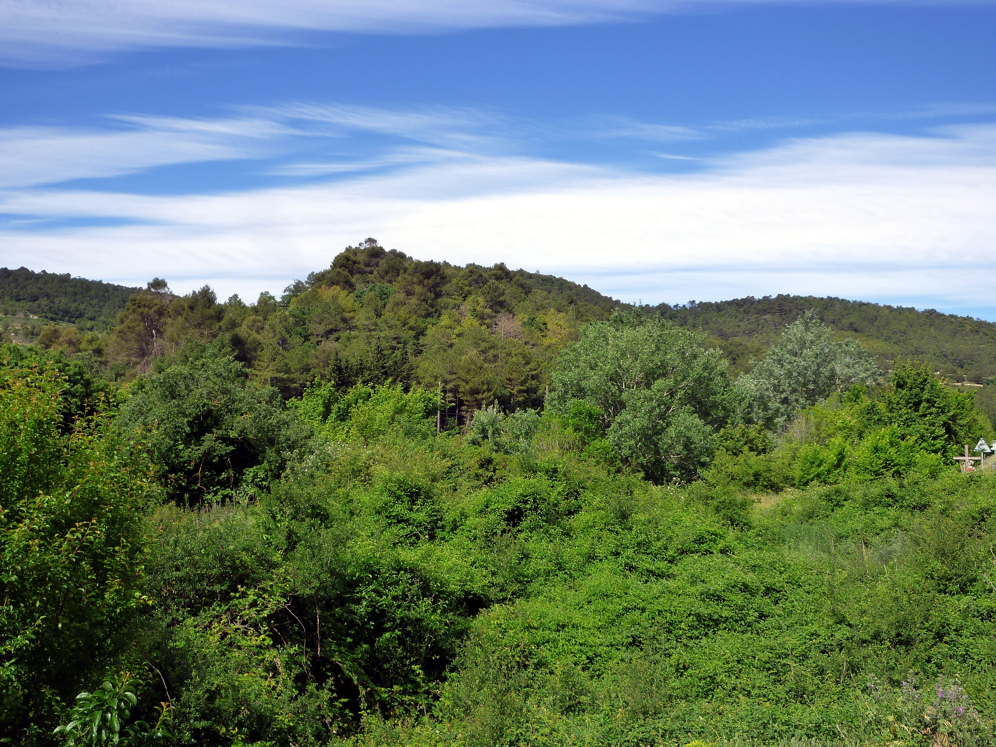 Parc Carbasí (Anoia): Costes del marge esquerre del torrent del Molí de les Vinyes, en el seu sector final, des de l'inici de la carretera d'Argençola. This is a a photo of a natural area in Catalonia, Spain, with id: ES510096